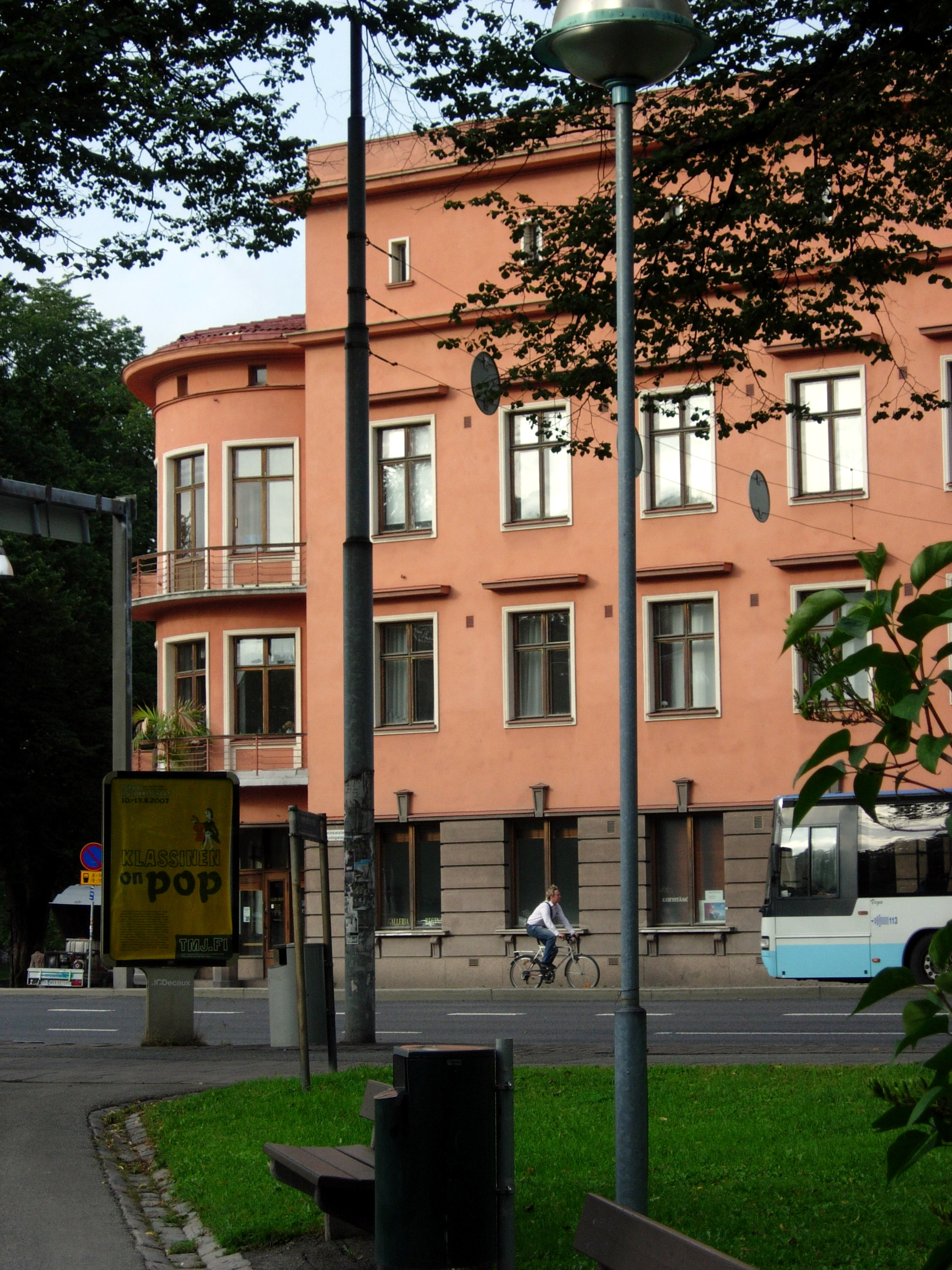 Linnankatu 1, Linnankadun ja Aninkaistenkadun kulmassa. Rakennuksessa toimii Galleria Regina.